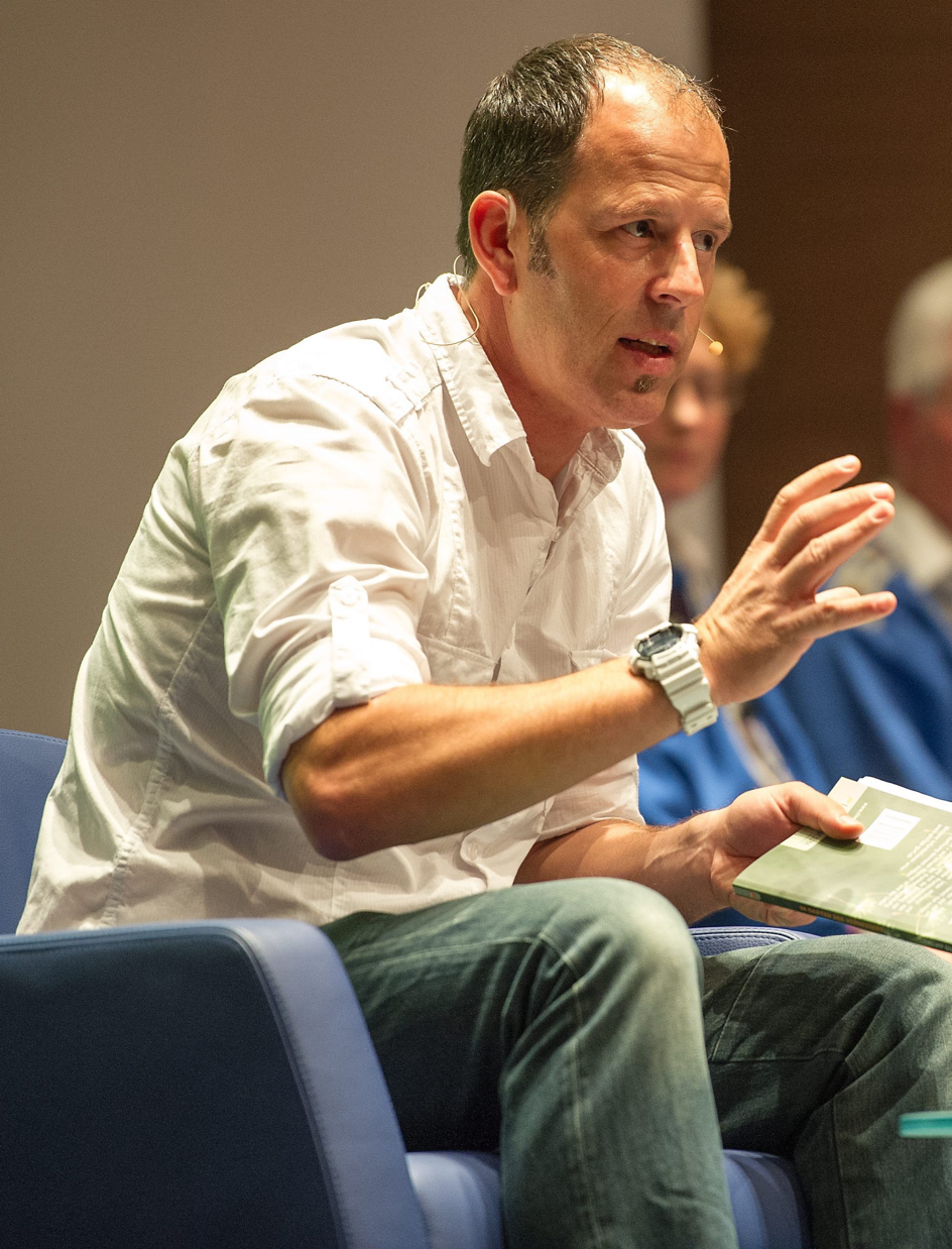 Lesung